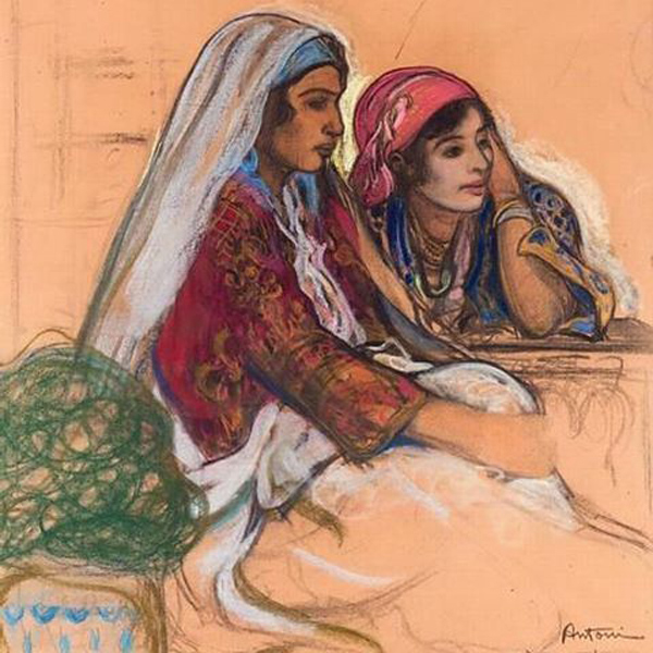 Deux Algériennes